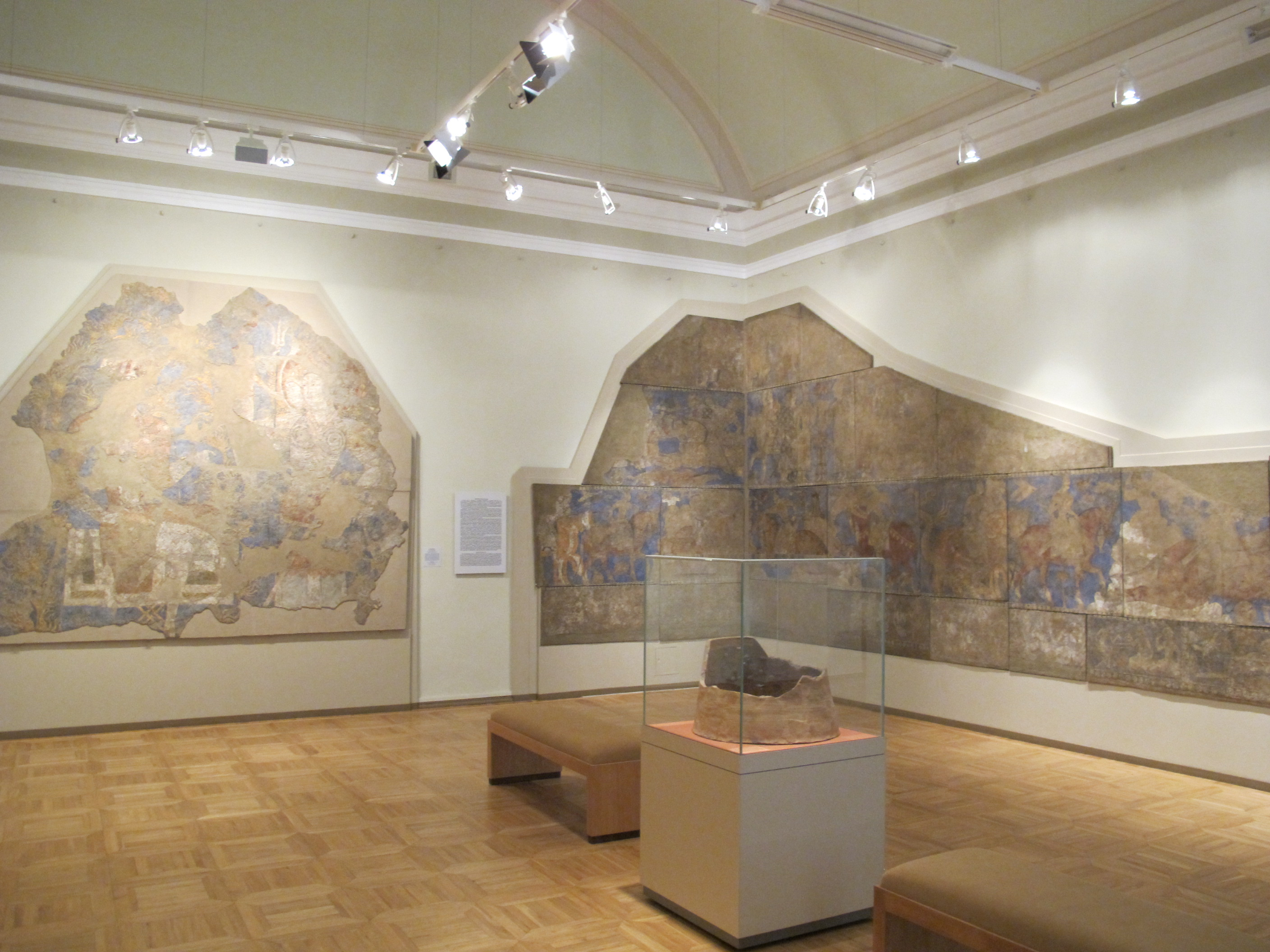 Parte della composizione a più registri della sala cerimoniale (blu), pendjikent, sett. VI, cam. 41, angolo n.o., 740 ca. 2